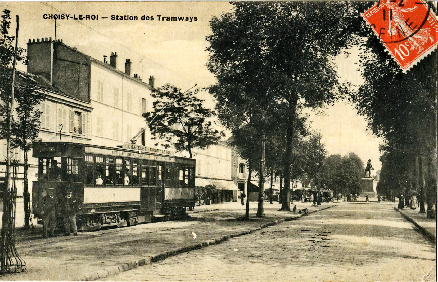 Carte postale ancienne sans mention d'éditeur :CHOISY-LE-ROI - Station des Tramways